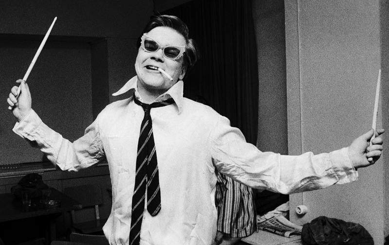 Markus Heikkerö Sleepy Sleeperseissä vuonna 1977